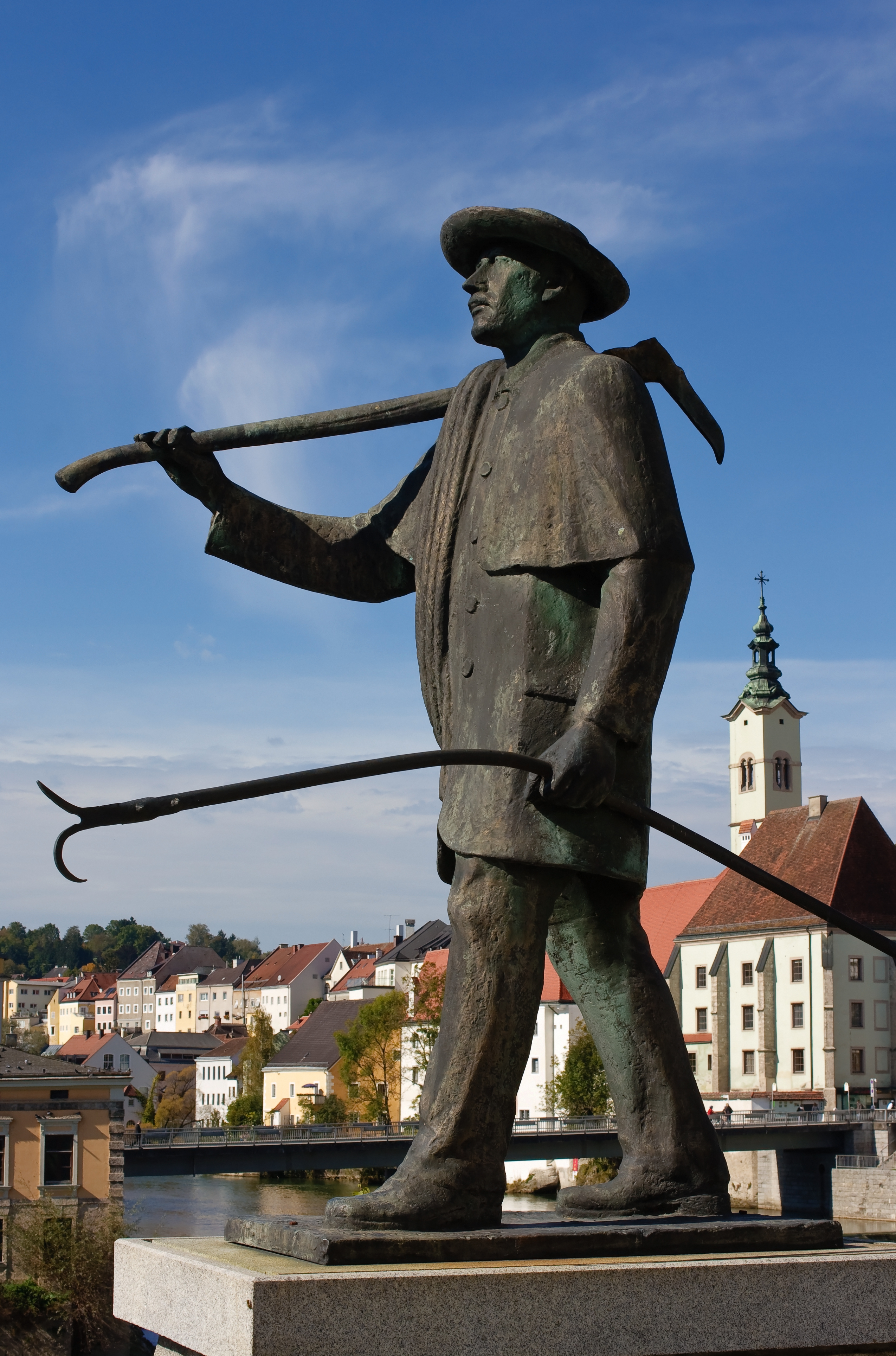 Das Flößerdenkmal in Steyr. Es wurde anlässlich des 1000-jährigen Bestehens der Stadt Steyr 1980 von der Ennskraftwerke AG gestiftet (Widmungstafel am Sockel). Künstler ist Josef Diethör (1919 – 2006)